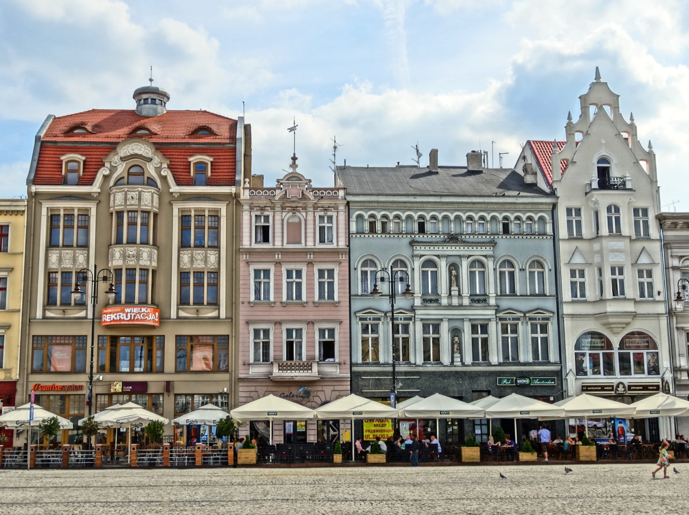 Południowa pierzeja Starego Rynku w Bydgoszczy